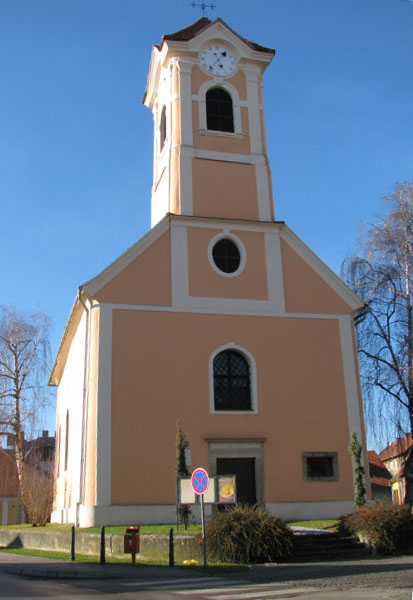 Crkva sv. Vida, Varaždin, Vidovski trg